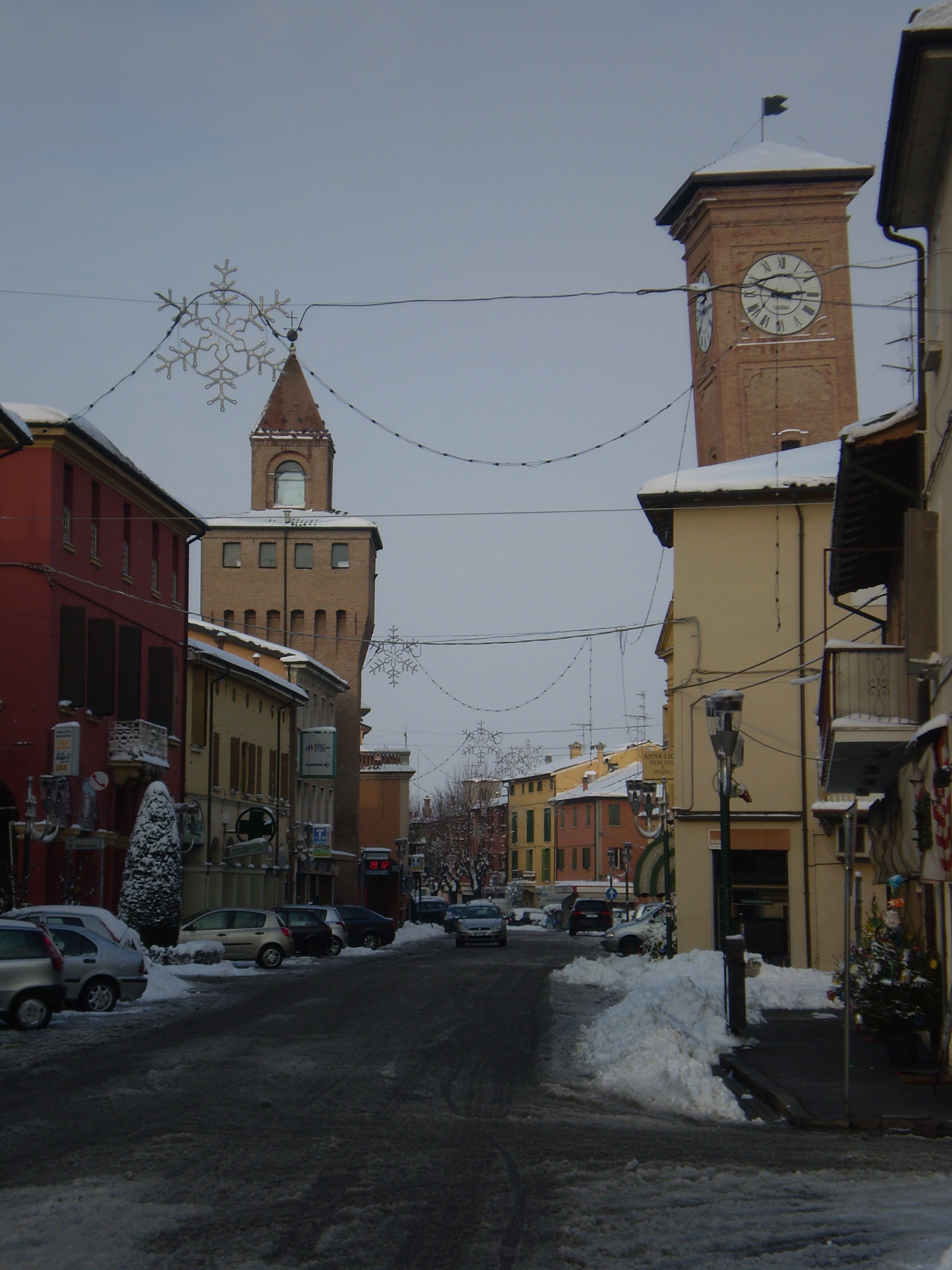 Torre di Santo Stefano e Campanile di San Matteo